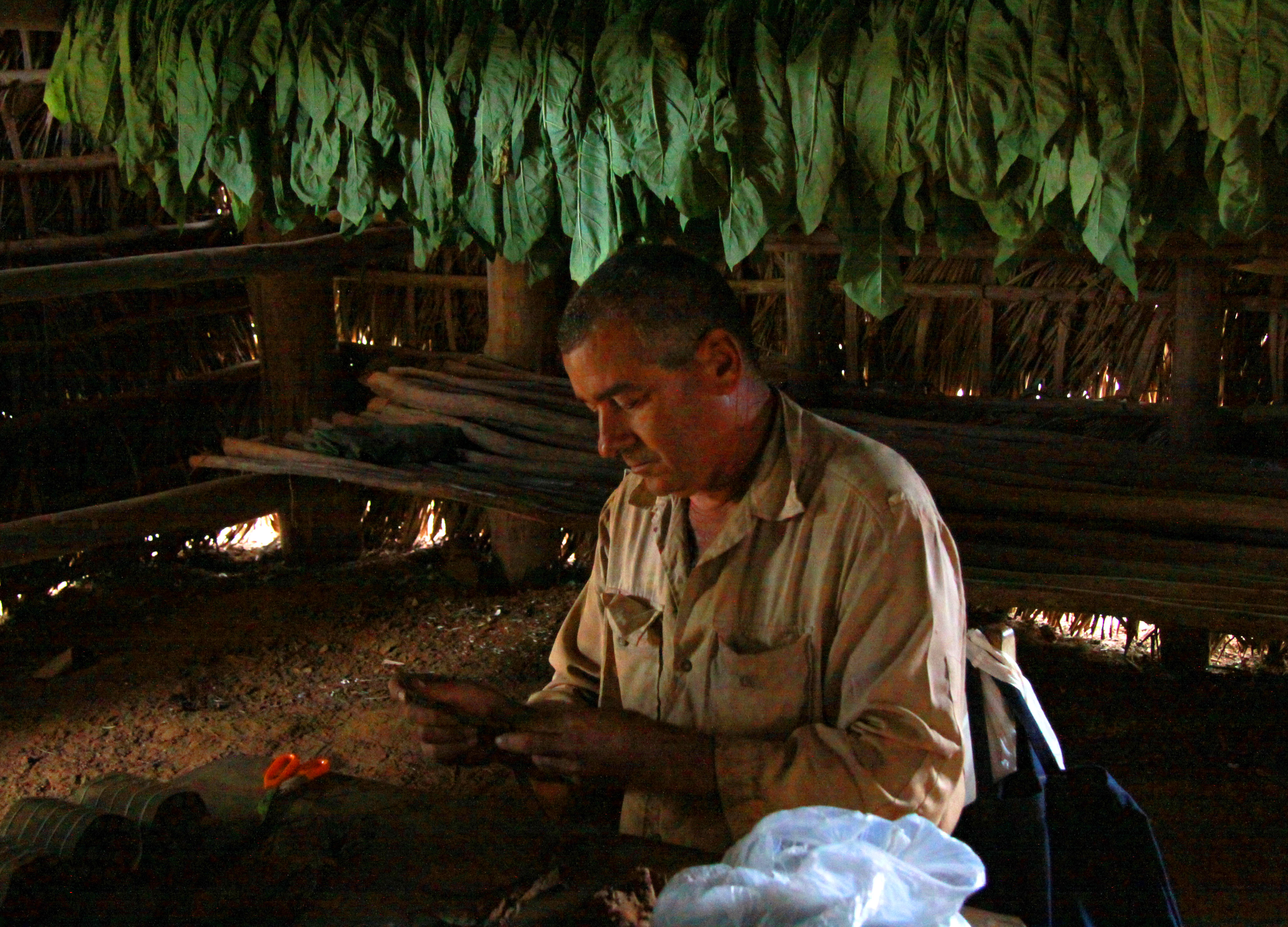 Viñales. Dans un séchoir à tabac.